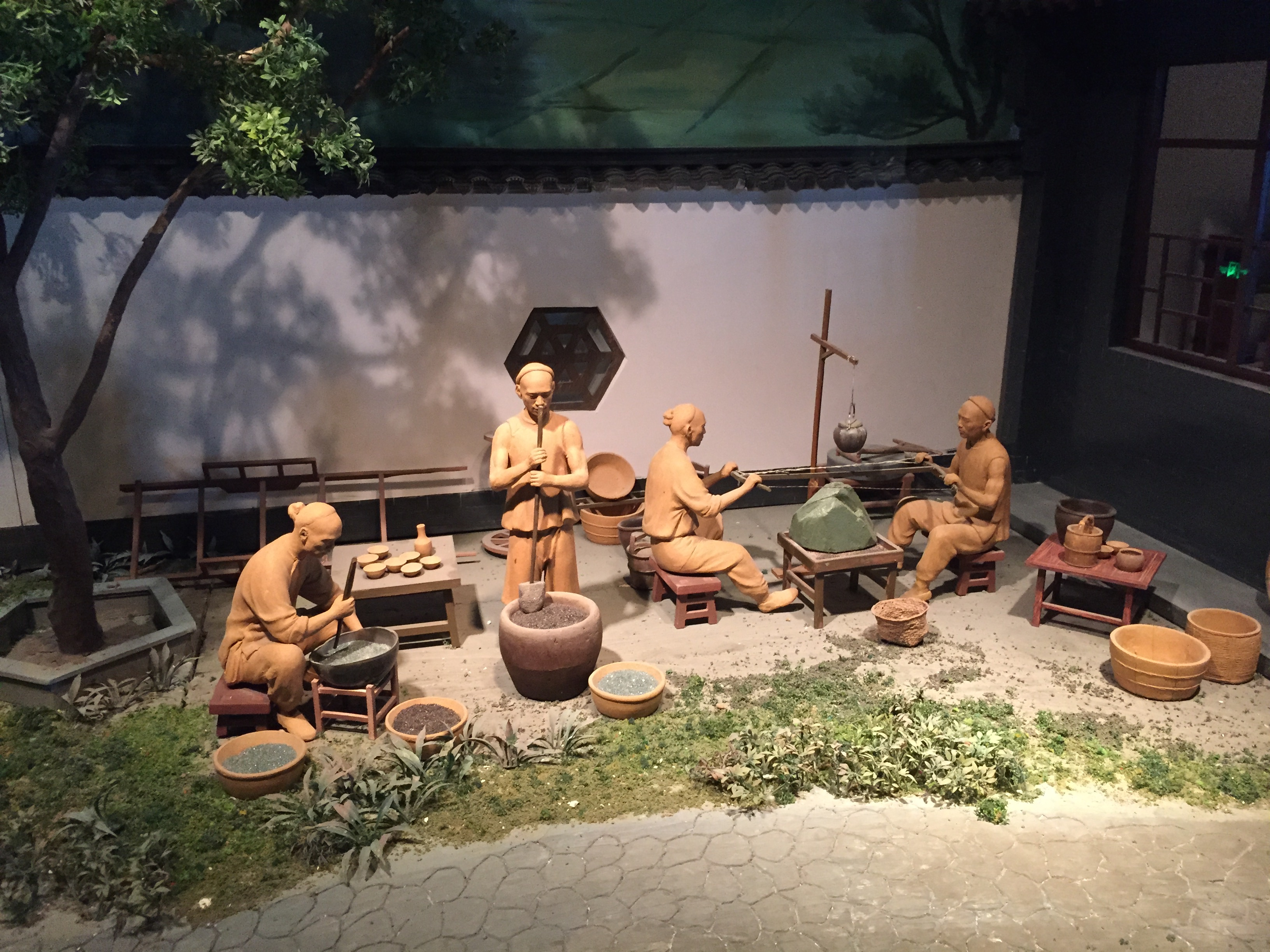 中文（中国大陆）: 辽宁省博物馆模拟制玉器场景